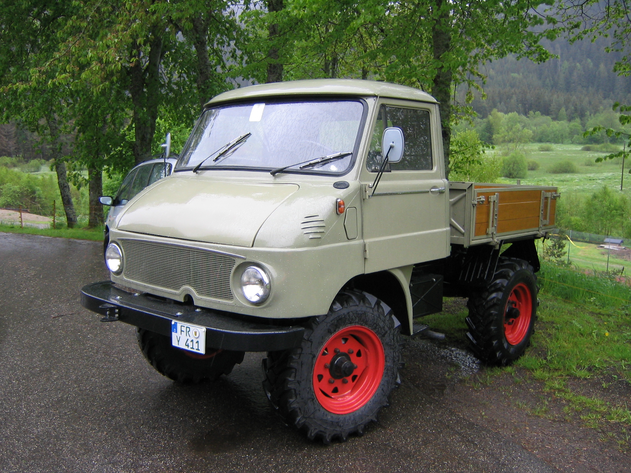 Unimog bei Oldtimer-Traktorentreffen in Titisee-Neustadt